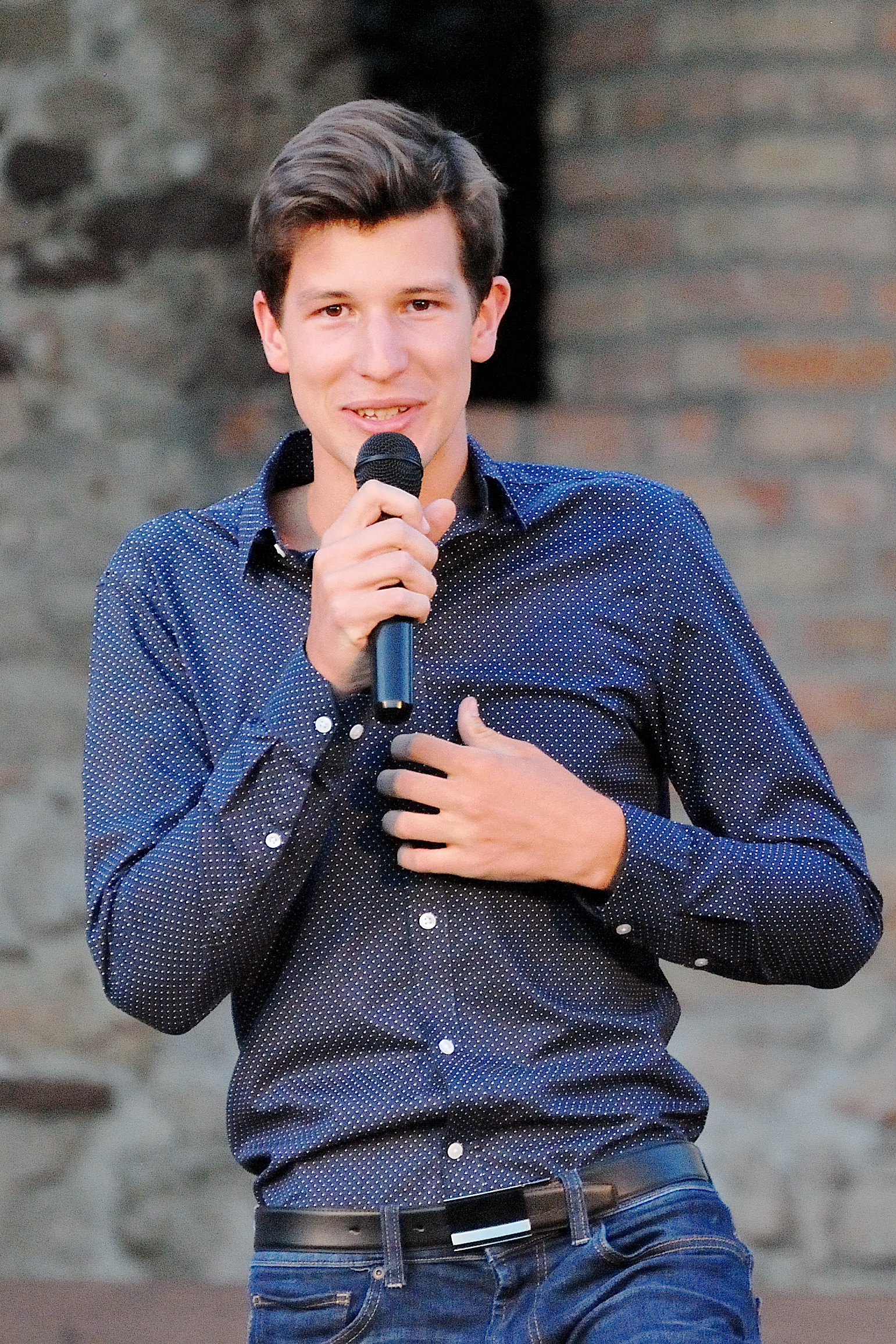 László Attila énekes Balatonfűzfőn előadás közben